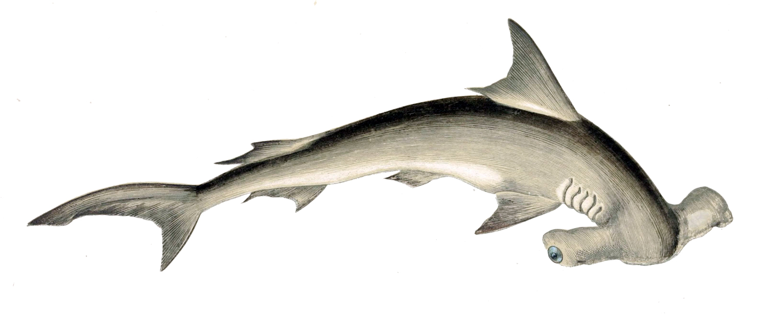 Sphyrna lewini